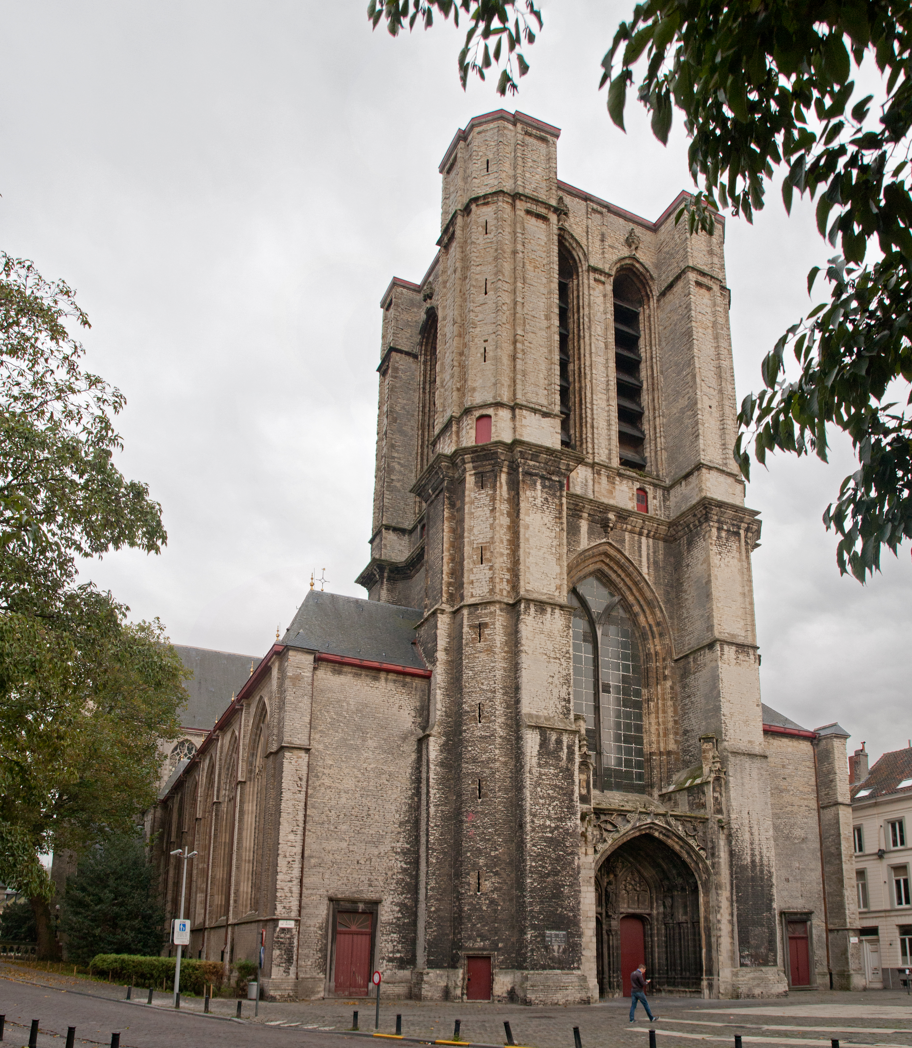 Sint-Michielskerk, Gent.